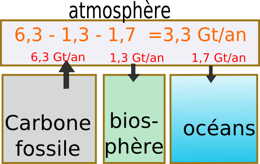 déséquilibre du cycle du carbone